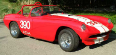 La Dawri Daytona